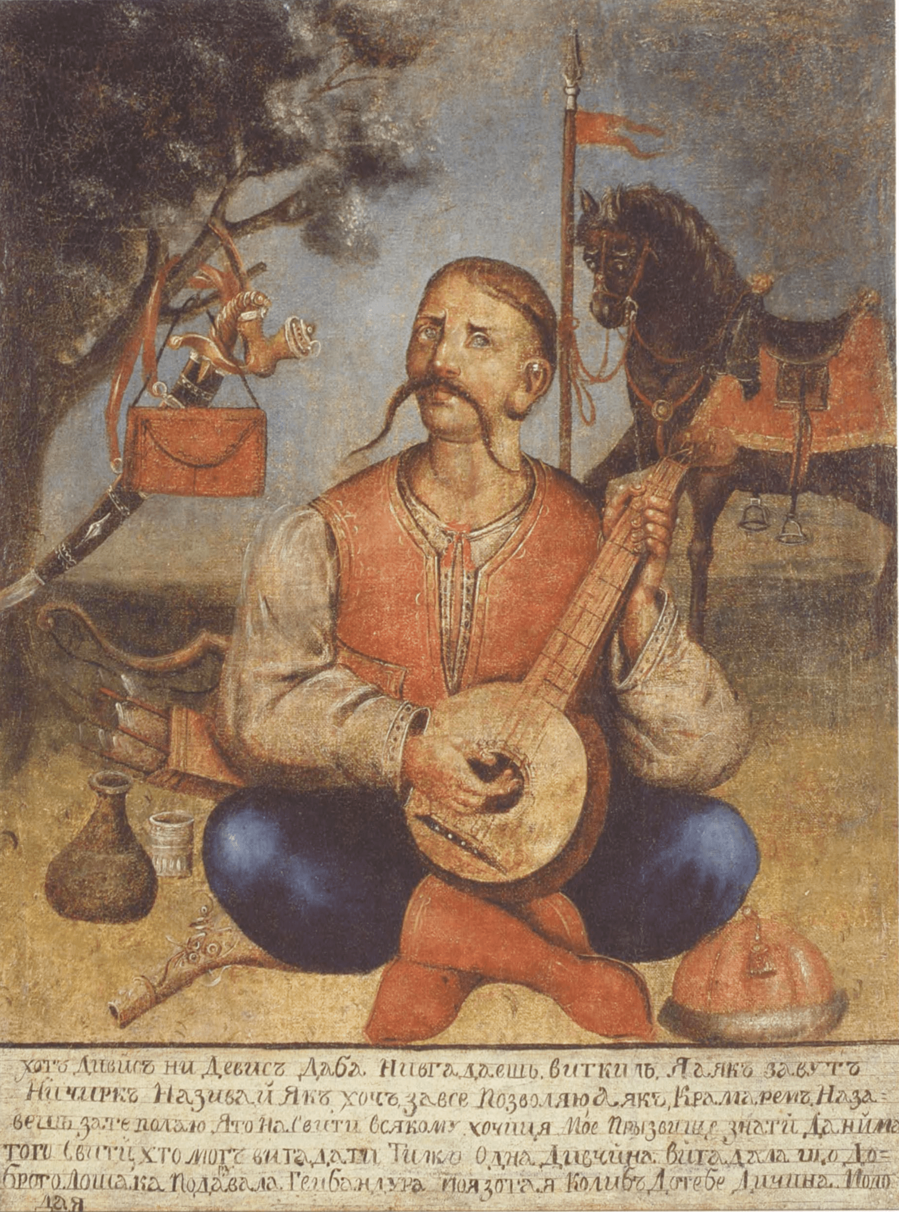 Козак Мамай, XVIII ст. Полтавська обл. Полотно, олія, 87,7 x 67,1 ЦНК "Музей Івана Гончара" Напис під зображенням: “Хоть Дивисъ ни Девисъ Даба Нивгадаешь, виткиль Я а якъ завуть Ничичиркъ Называй Якъ хочъ, завсе Позволяю, А якъ Крамаремъ Назавешъ зате полаю Ято на Свити всякому хочиця Мое Прызвище знати Данима того Свити, хто могъ вигадати Тилко Одна Дивчина вигадала що Доброго Лошака Подавала. Геи бандура моя зотая Колибъ Дотебе Дичина Молодая"